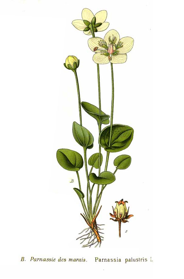 Parnassia palustris L.